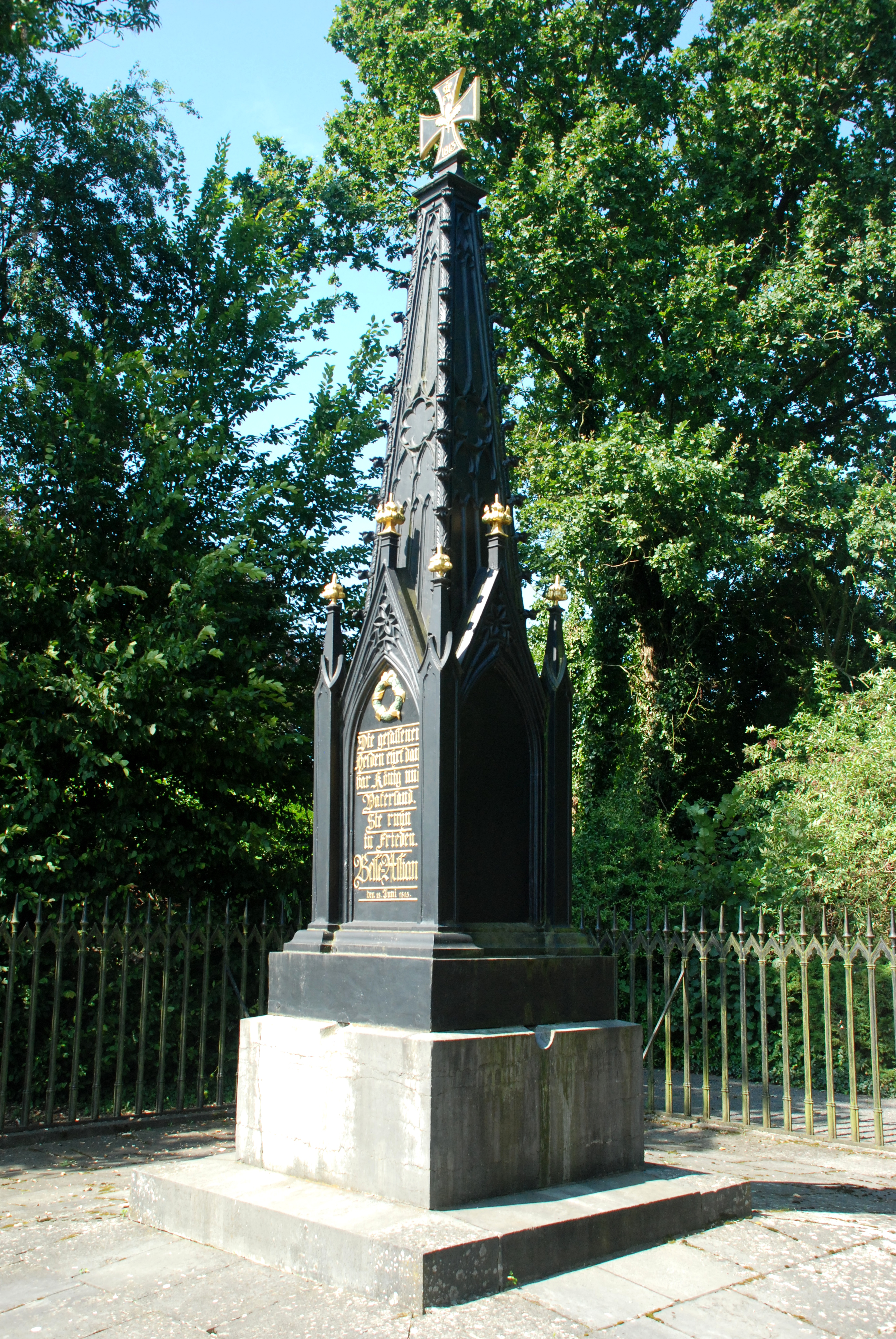 Belgique - Brabant wallon - Monument prussien